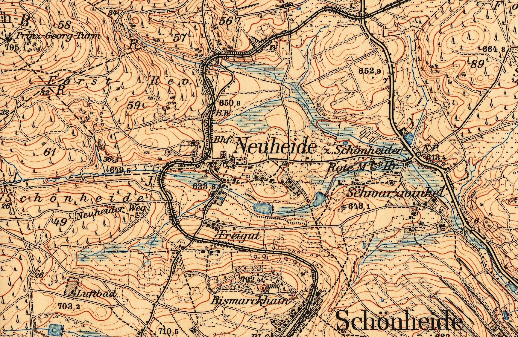 Diese Karte im Maßstab 1 : 25.000 (aus der Zeit nach 1915 - Fuchsstein schon in Bismarckhain umbenannt) zeigt zahlreiche Details des 1949 nach Schönheide eingemeindeten Dorfs Neuheide, seine Lage süd-östlich des Kuhbergs, den Verlauf des in der Karte unbezeichneten Filzbachs vom Kuhberghang bis zur Straßen von Schönheide nach Stützengrün, die beiden Teiche im Verlauf des Filzbachs, deren Wasser den Betrieb der Roten Mühle auch bei Niedrigwasser zuließ. Die Rote Mühle gehörte nicht zu Neuheide, die Karte nennt als gebietliche Zugehörigkeit „Schönheider Hr.“ (also Schönheiderhammer). Der N.P. (= Nivellierungspunkt) an der Straße Schönheide-Stützengrün gibt den niedrigsten Punkt Neuheides an: 613,4 Meter. Der Haltepunkt Neuheide der Schmalspurbahn Wilkau-Haßlau-Carlsfeld wird als „Bhf.“ (= Bahnhof) bezeichnet. Der Verlauf der Bahnstrecke ist gut zu sehen. Sie wird seit 1994 von der Museumsbahn Schönheide befahren. Dabei wird auch der Haltepunkt Neuheide bedient. Am Nordhang des Fuchssteins findet sich auf der Terrasse die Angabe „Freigut“, von dort begann wahrscheinlich die Besiedlung Neuheides. Deutlich sind die nassen Wiesen bzw. Moore (Filz als oberdeutscher Begriff für Moor, daher der Name Filzbach) zu erkennen, im Bereich nördlich des Wortes "Schönheider Hr." ist ein Torfstich eingezeichnet. Östlich davon liegt jenseits der Straße der "schwarze Teich". Die R. Mühle, also Rote Mühle ist ausdrücklich genannt, das "z. Schönheider Hr. (= Schönheiderhammer)" informiert darüber, dass diese Wassermühle nicht zur Gemeinde Schönehide, sondern zur Gemeinde Schönheiderhammer gehörte. Oberhalb der Mühle ist zu sehen, dass der Filzbach gestaut ist, oben liegt der Herrenteich, darunter der Mühlteich, der für ausreichende Wassermengen auch in niederschlagarmen Zeiten sorgen sollte.